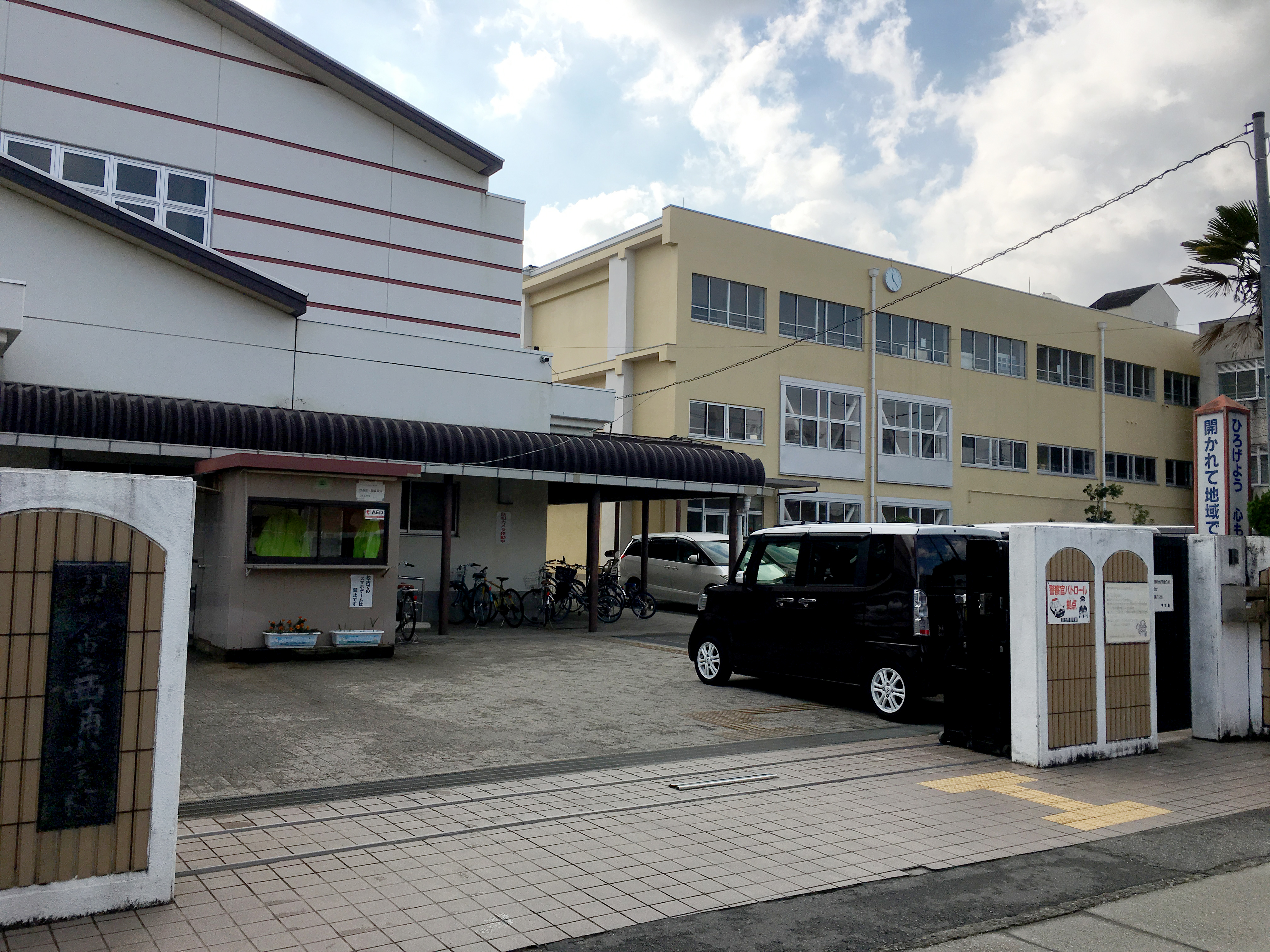 羽曳野市立西浦小学校